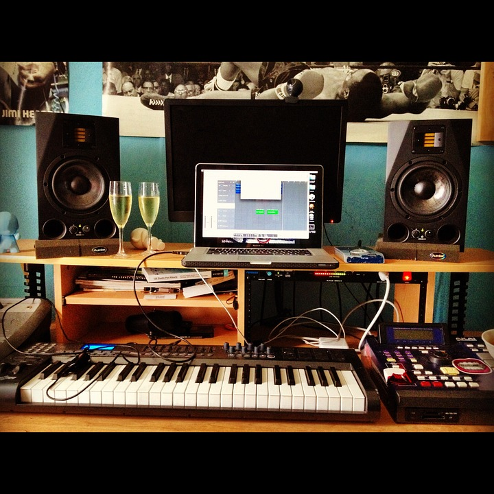 Musique assisté par ordinateur avec : ordinateur, clavier maitre, sequencer, enceintes de moniteurs